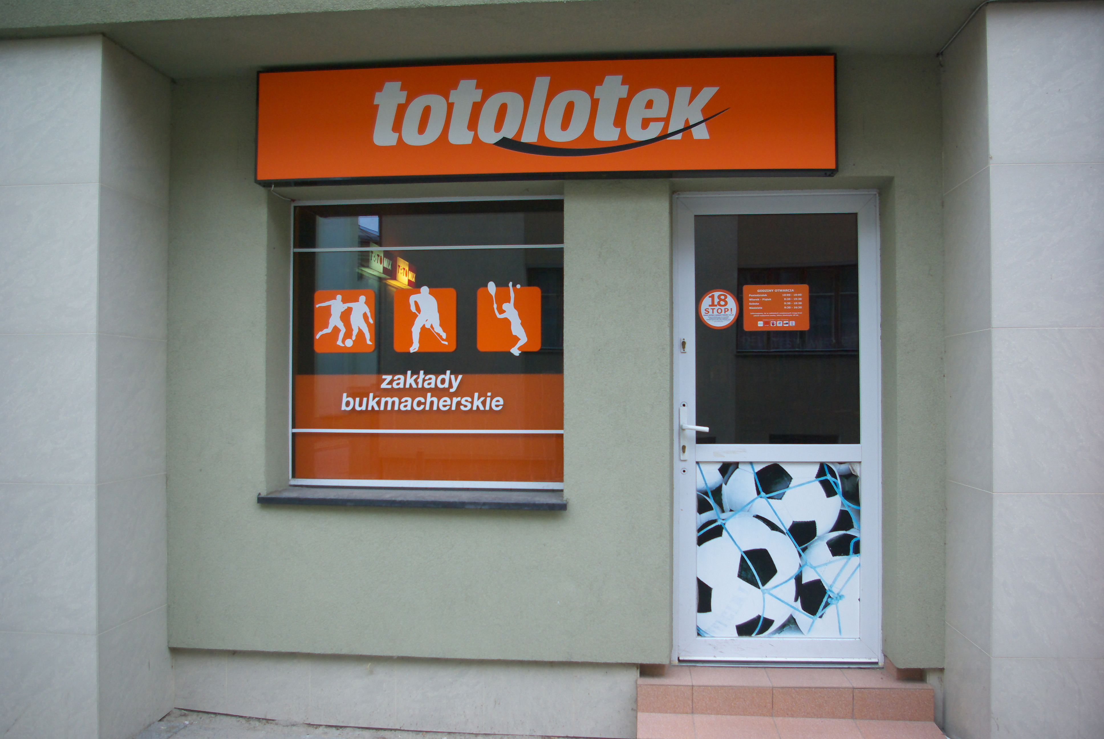 Budynek przy ulicy Grzegorza z Sanoka 6 w Sanoku. Totolotek